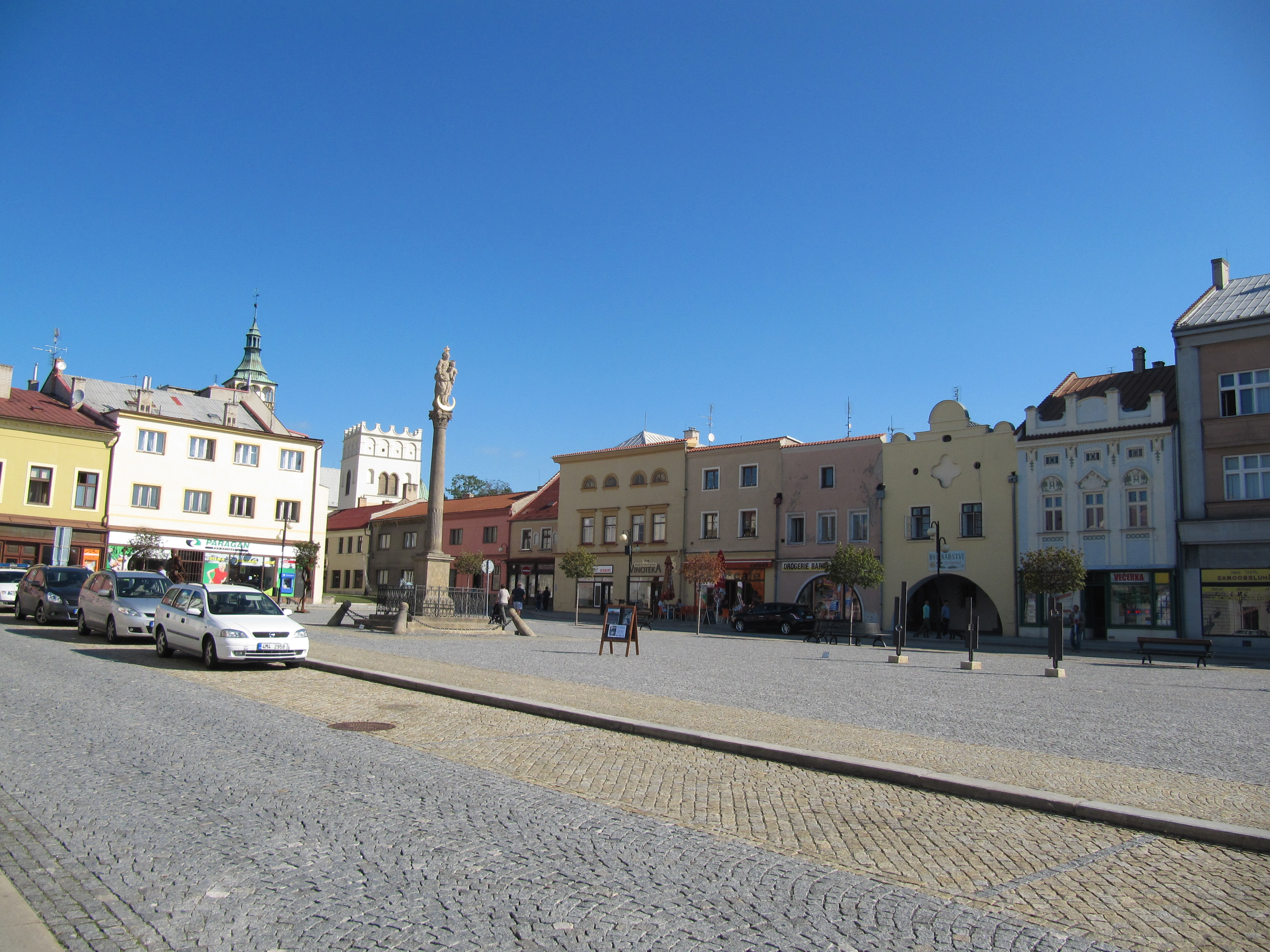 Lipník nad Bečvou